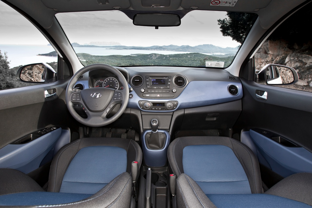 Hyundai i10 manual interior